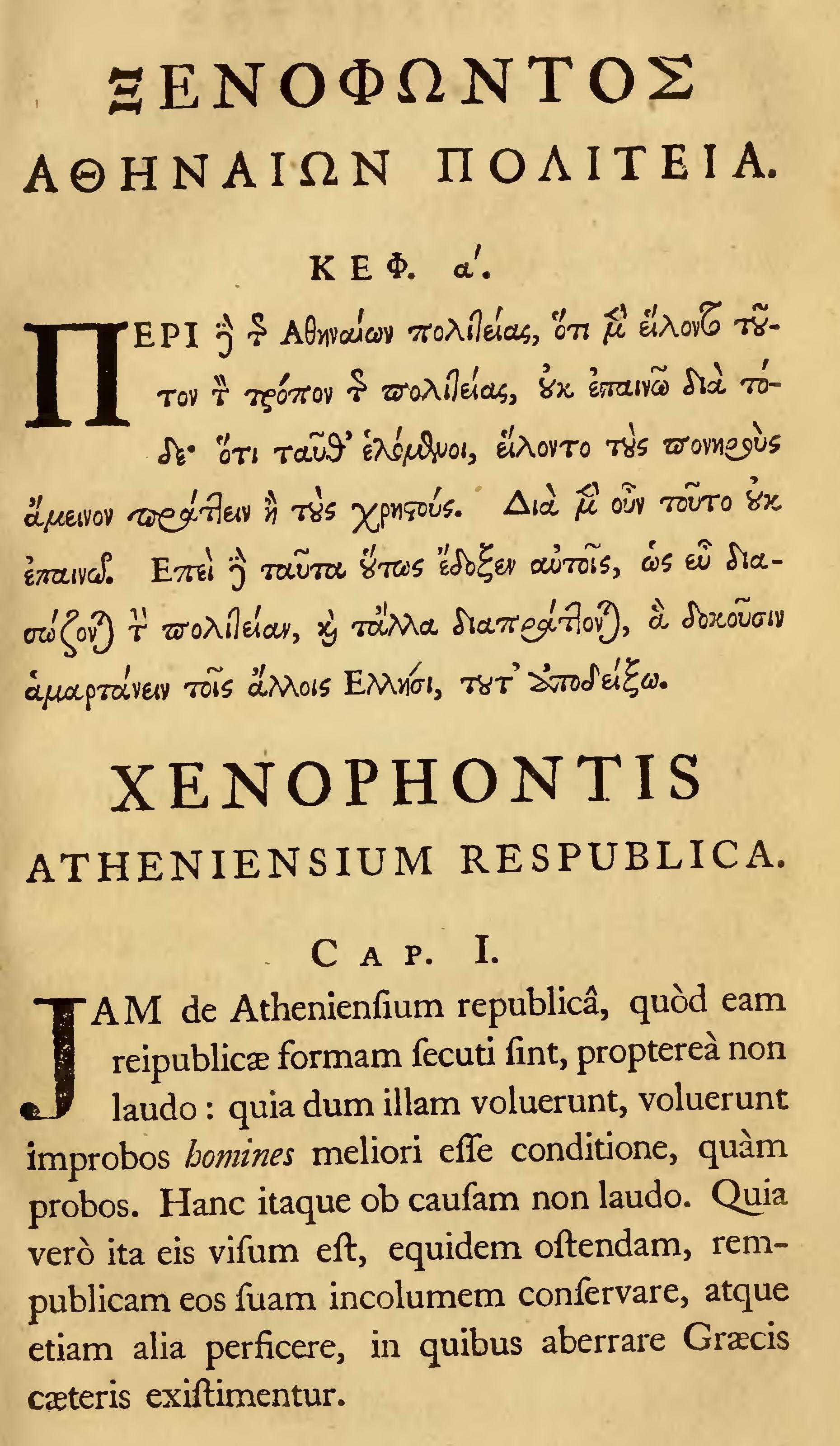 Страница из книги с малыми сочинениями Ксенофонта, издательство Clarendon. Оксфорд, 1754 год. Начало Афинской политии, греческий оригинал и латинский перевод.